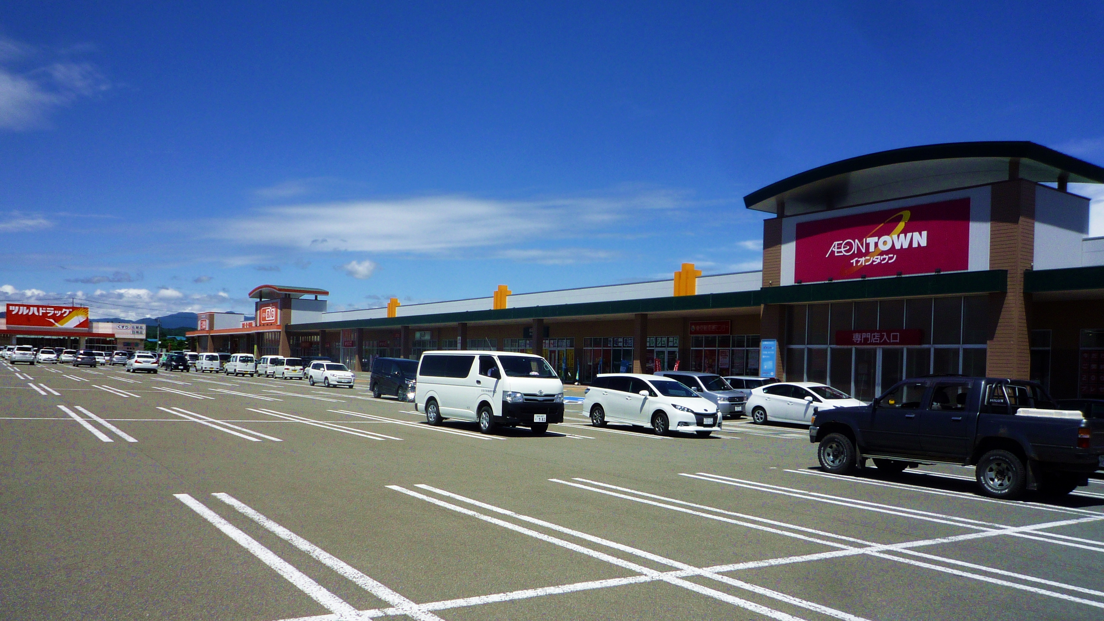 イオンタウン鷹巣（秋田県北秋田市）